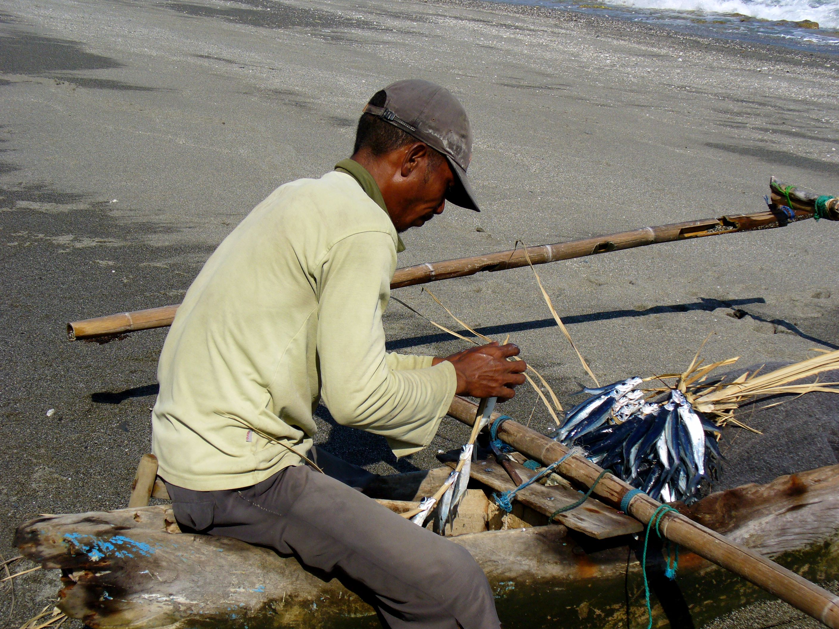 Maubara, East Timor